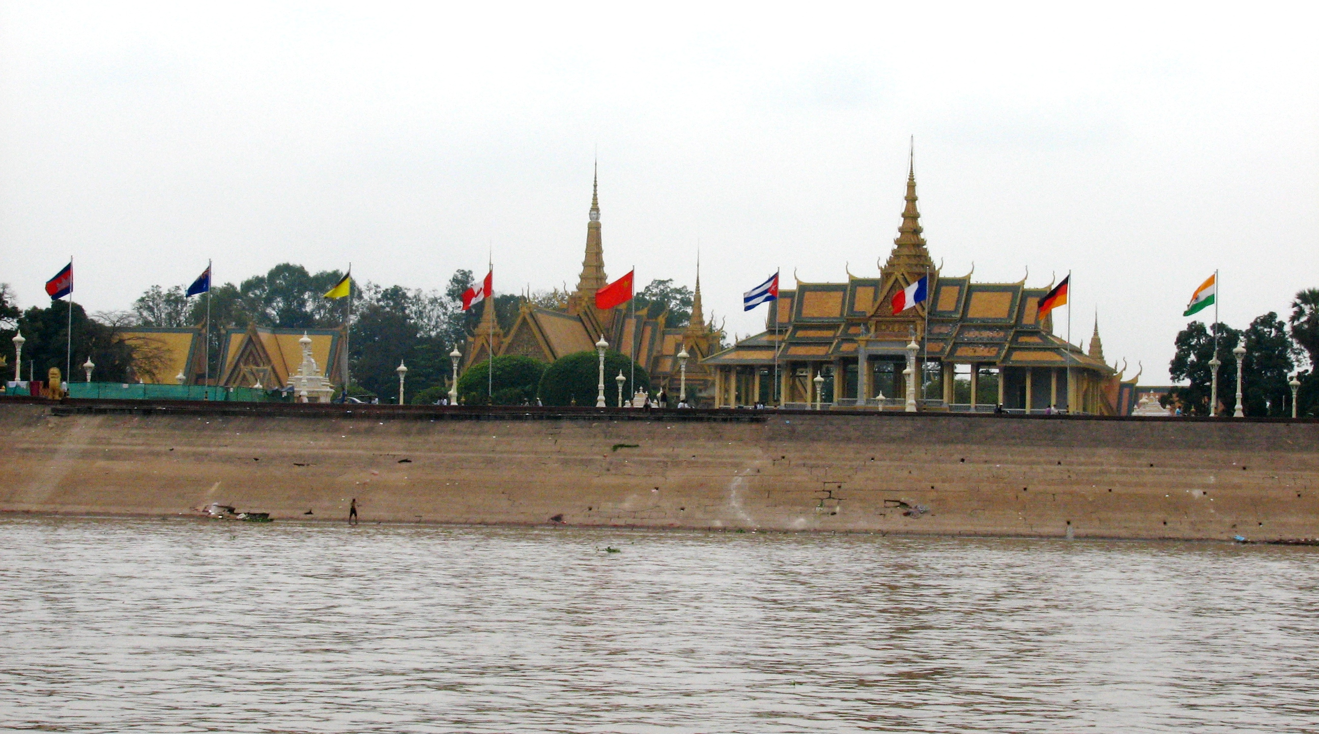 Royal Palace including View from the river Phnom Penh Cambodia הארמון המלכותי בפנום פן, מבט למגיעים דרך נהר המקונג מכוון ויטנאם. לקמבודיה